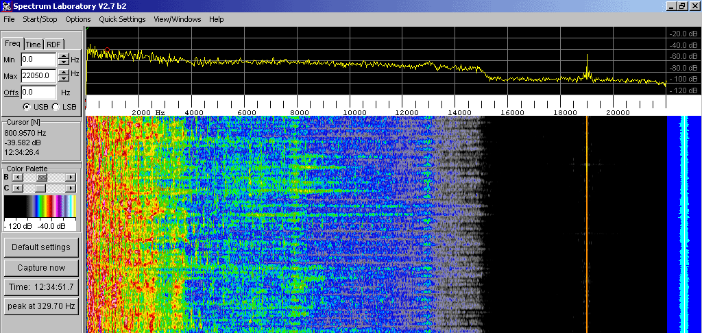 Frequenzspektrum zw. 0...20kHz (Scrollgeschwindigkeit 50ms/Zeile) einer Stereo-UKW-Radioübertragung, aufgenommen mit einem Mono-Radio. Gut zu erkennen ist der abrupte Abfall des Pegels bei 15kHz und der 19kHz-Pilotton